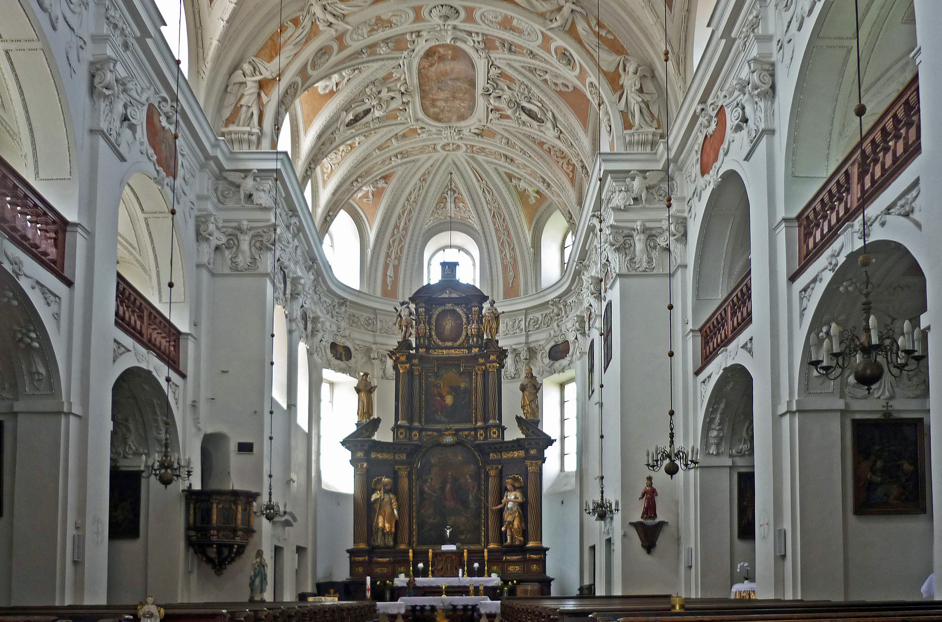 Inneres der Allerheiligenkirche in Klösterle (Klášterec nad Ohří)